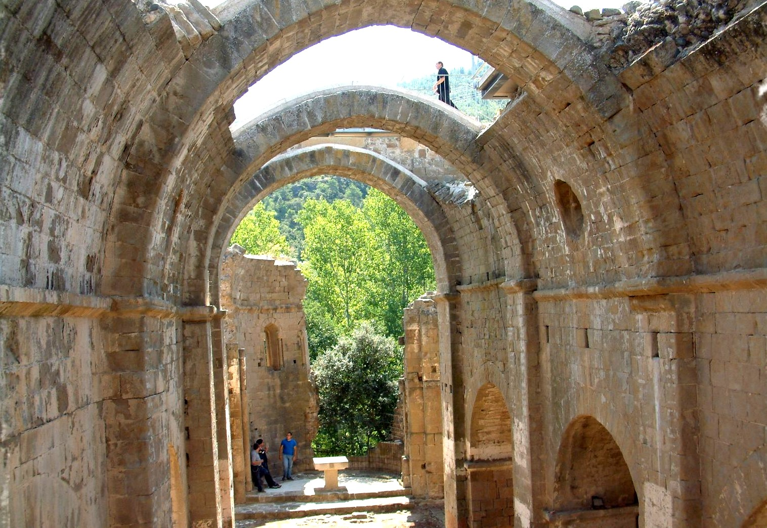 Iglesia del conjunto monástico de Santa María de Gualter, en La Baronía de Rialb (Prepirineo catalán).